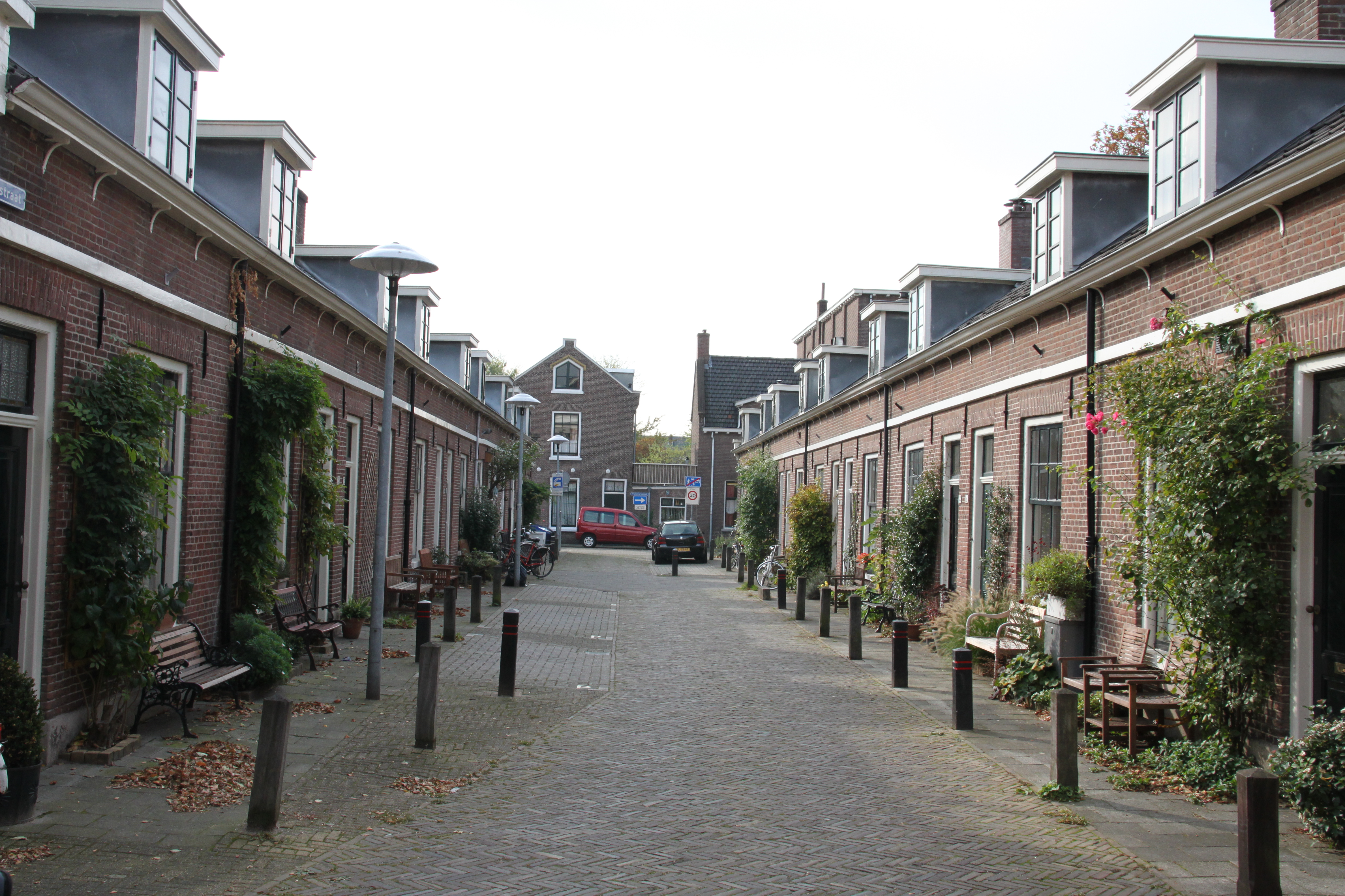 Arbeiderswoningen Moesstraat, Buiten-Wittevrouwen, Utrecht